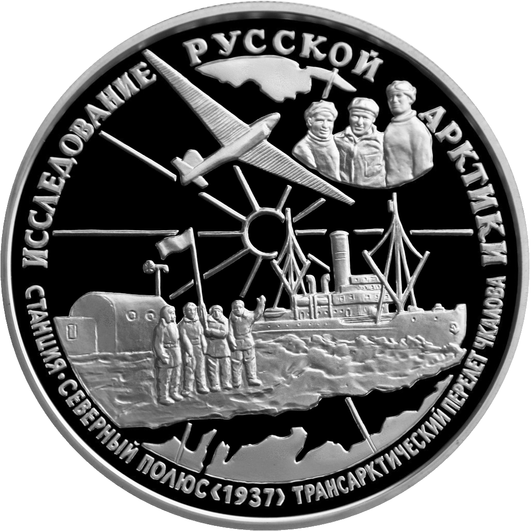 Монета Банка России — «Географическая серия», Исследование Русской Арктики, В.П. Чкалов, 25 рублей, реверс